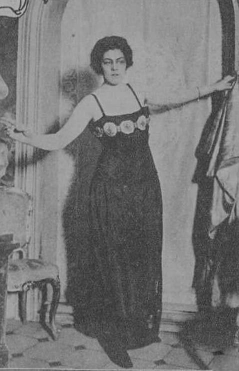 Märta Halldén i Den fula Ferrante 1919